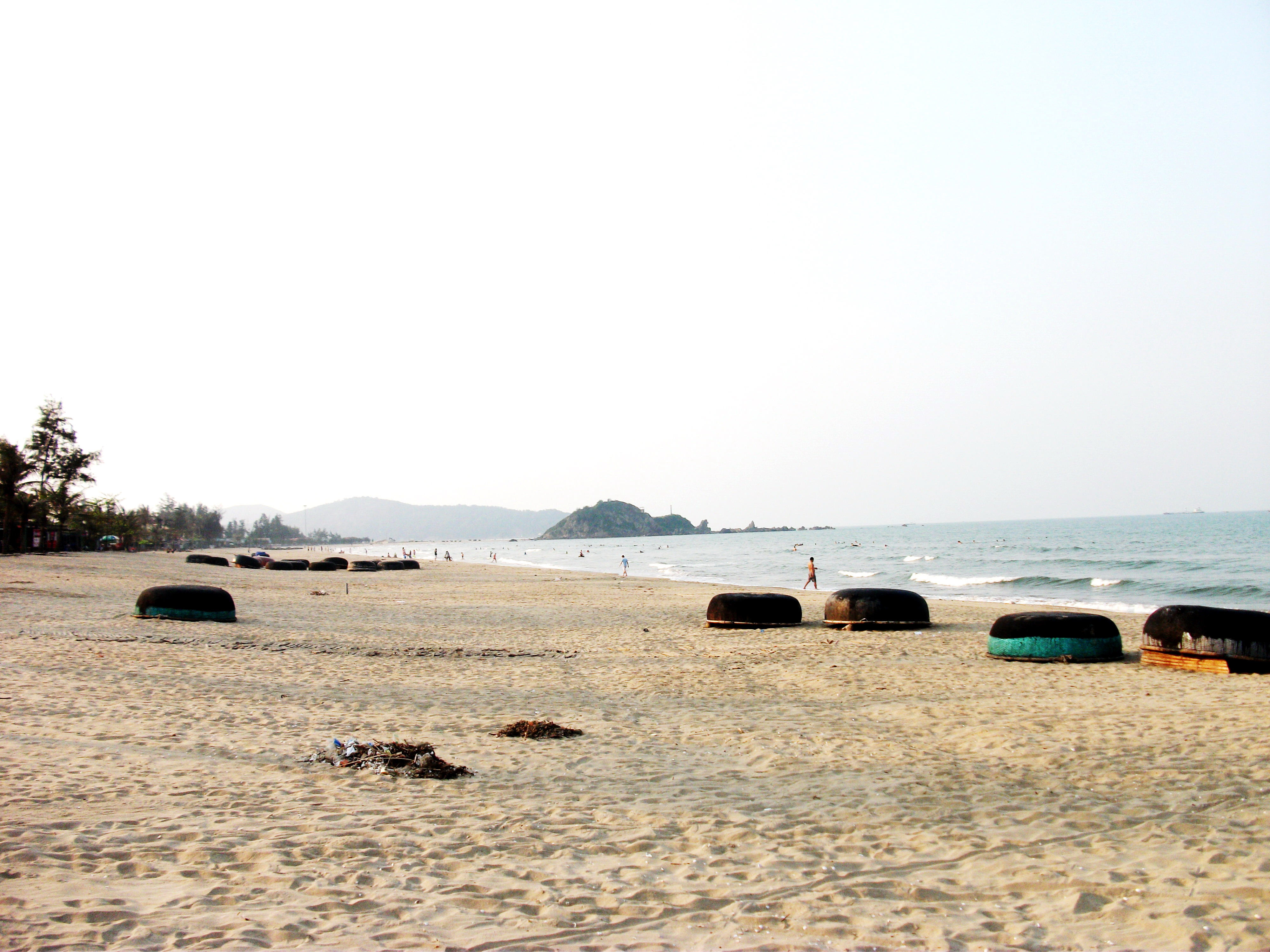 Bãi biển tại trung tâm Cửa Lò, thuộc tỉnh Nghệ An, Việt Nam.